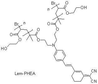 Colorant Lem-PHEA permettant l'imagerie vasculaire cérébrale